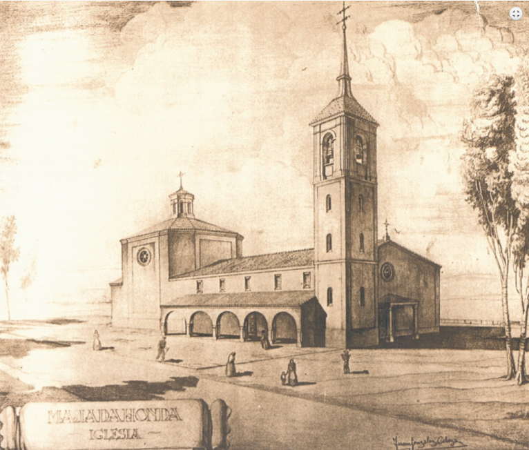 Grabado de la Iglesia de Santa Catalina